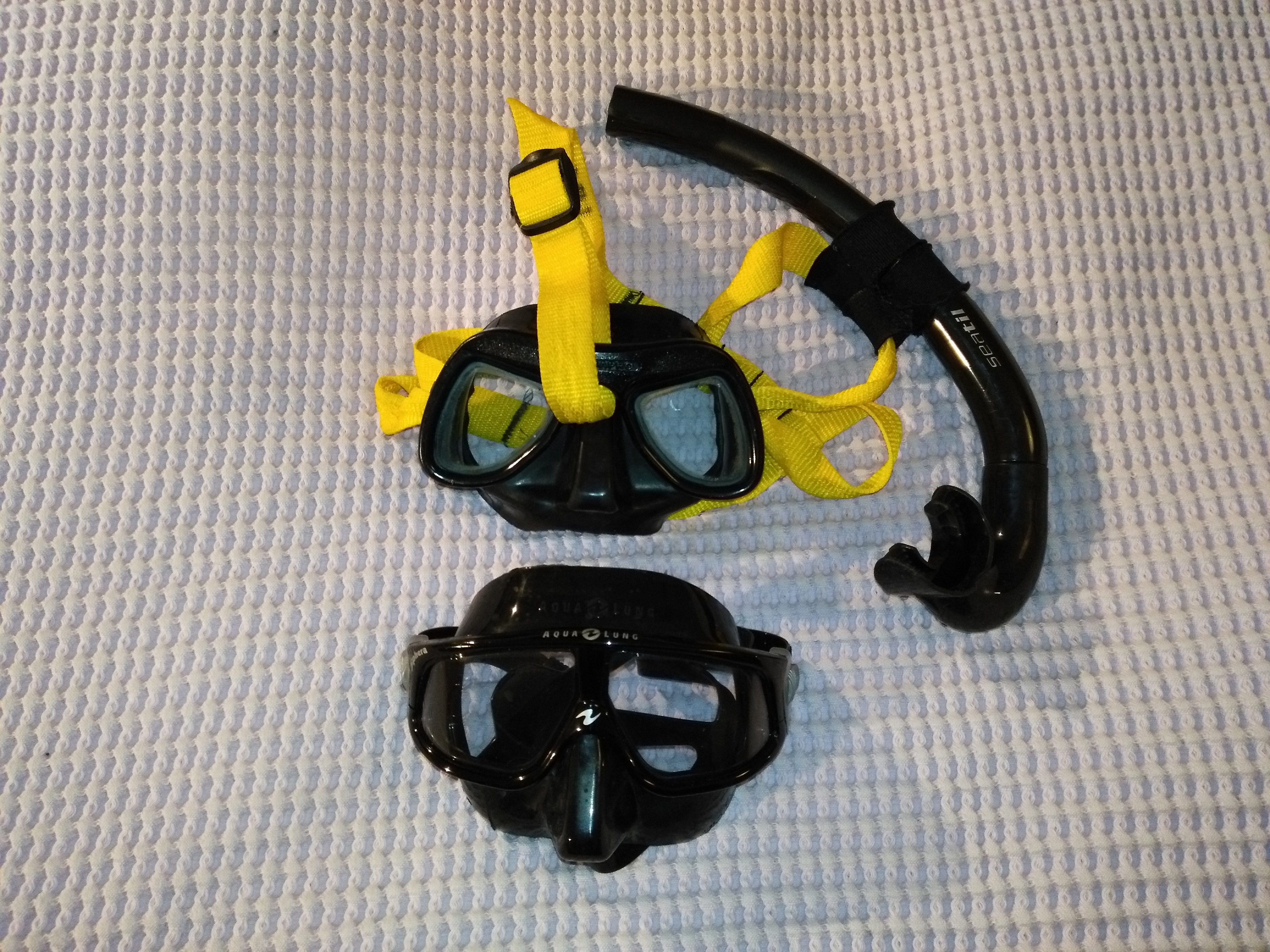 masks and maskbands for underwater rugby with snorkel